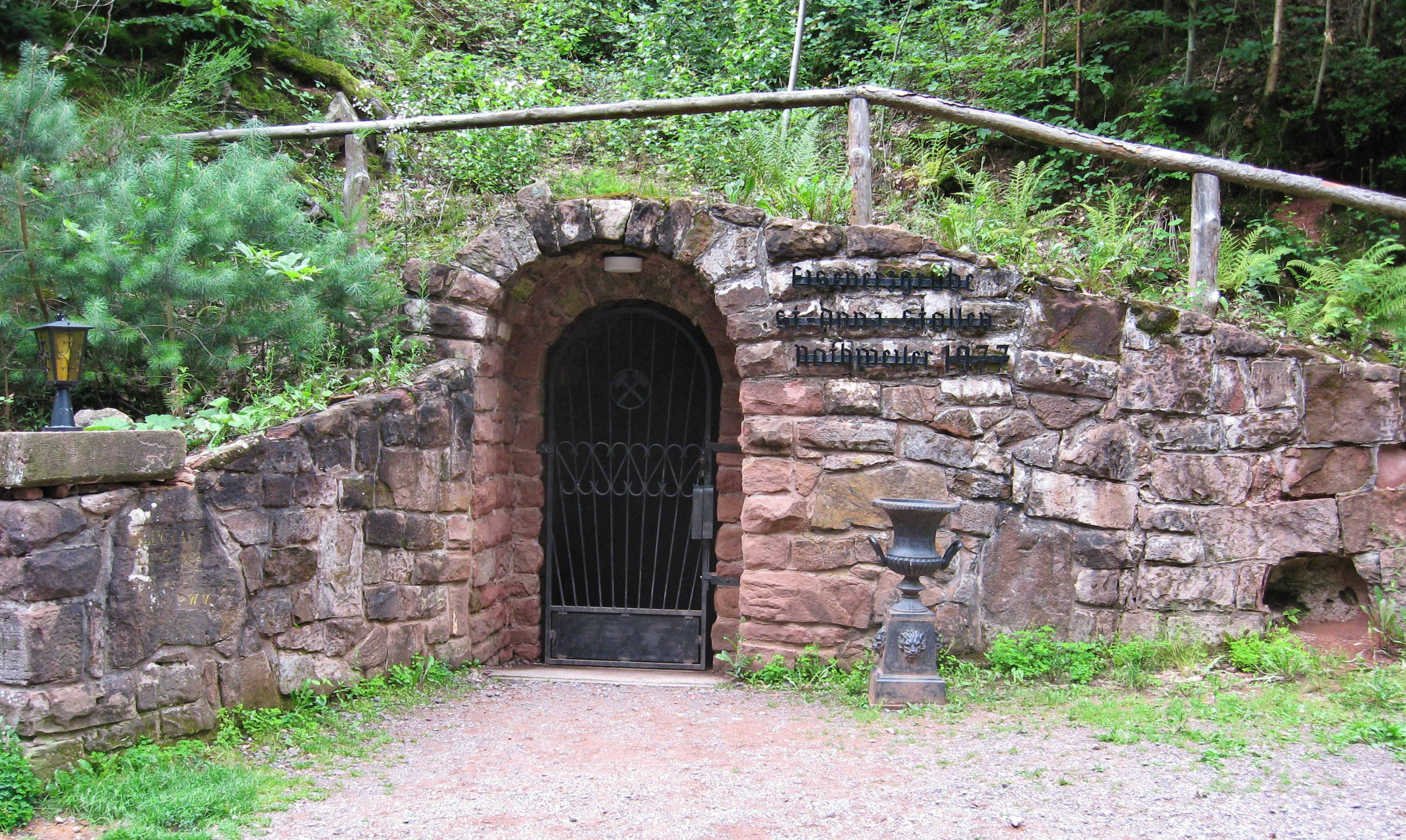 Mundloch des Erzbergwerks in St.-Anna-Stollen